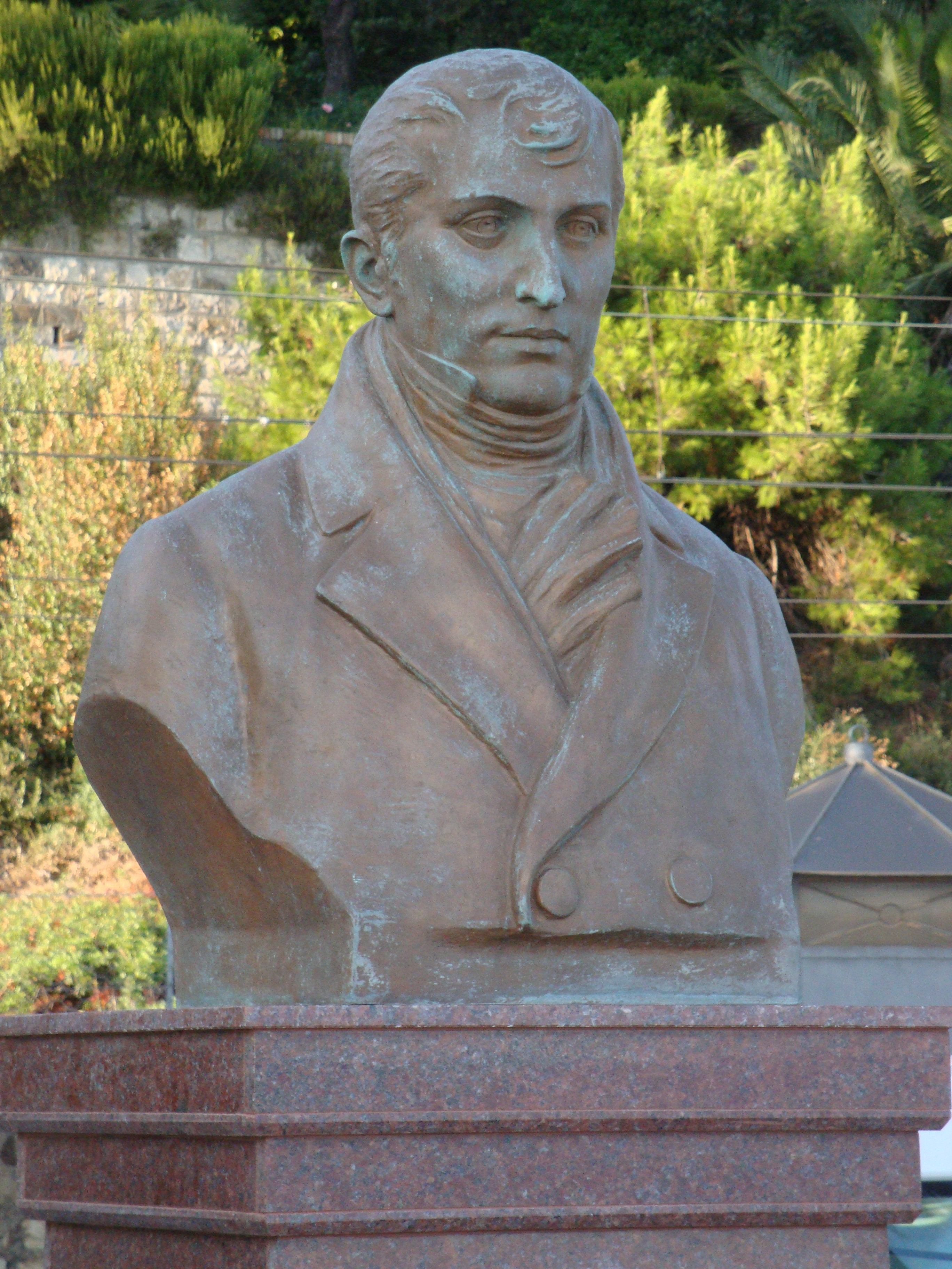 Imperia, busto del generale Manuel Belgrano Fotografia di Tony Frisina - Alessandria